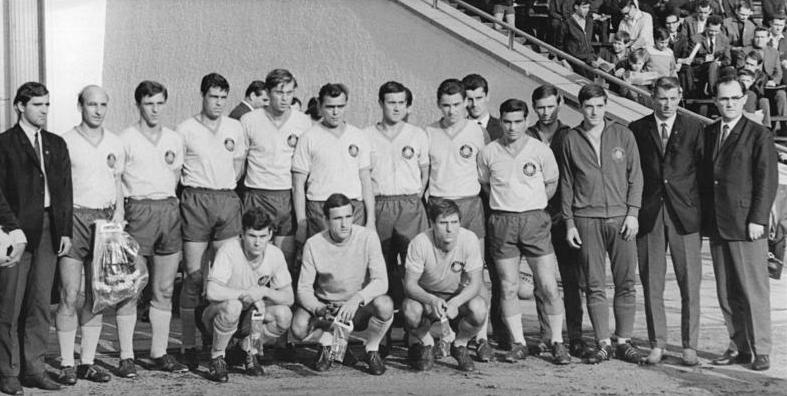 Zentralbild-Kluge Sche 6.12.1968 Fußball-Oberliga-Mannschaft 1. FC Lok Leipzig. Stehend v.l.n.r.: Berger, Drößler, Franke, Faber, Gießner, Geisler, Naumann, Pfeufer (halb verdeckt), Frenzel, Czichowitz, Gase, Buckewiz, Krauß, Nauert und Trainer Studener. Knieend v.l.n.r.: Löwe, Schulze und Zerbe.